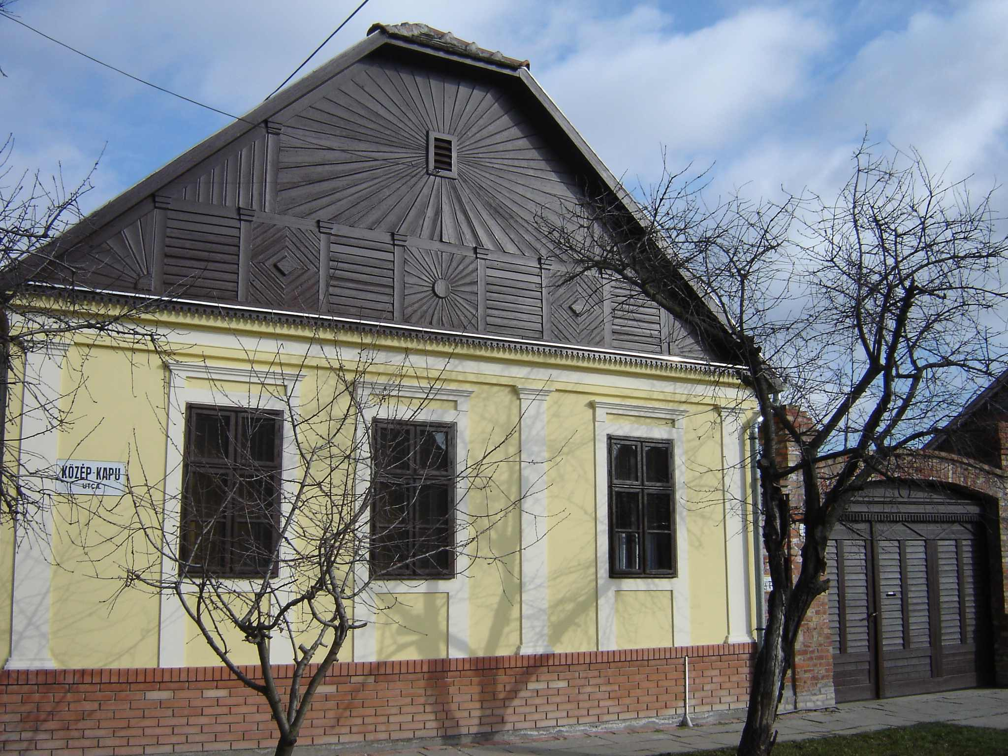 Szegedi napsugaras ház. Épült 1885-ben, kibővítették 1904 és 1912 közt (Szeged-Alsóváros)